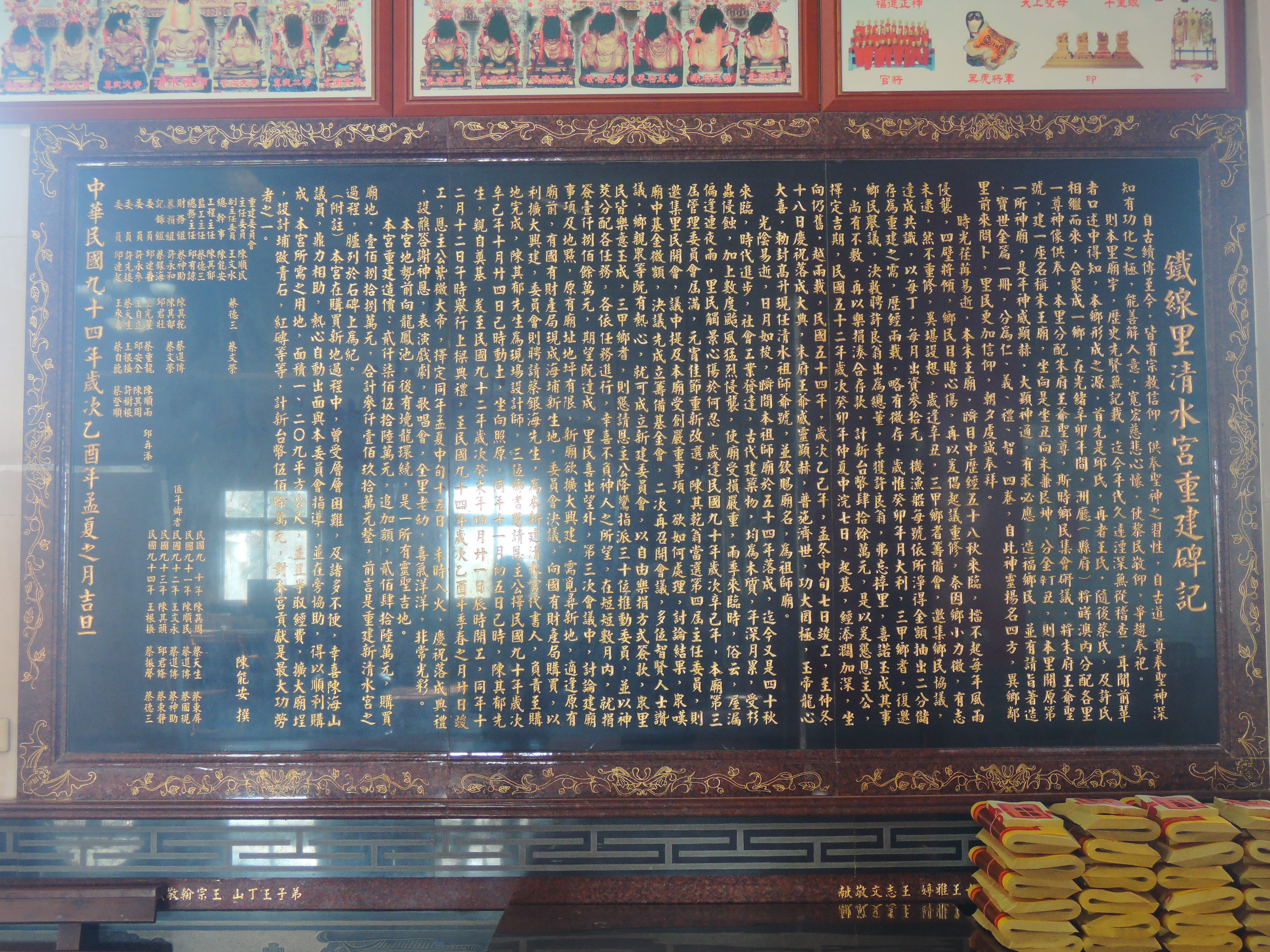 鐵線清水宮，主祀清水祖師。